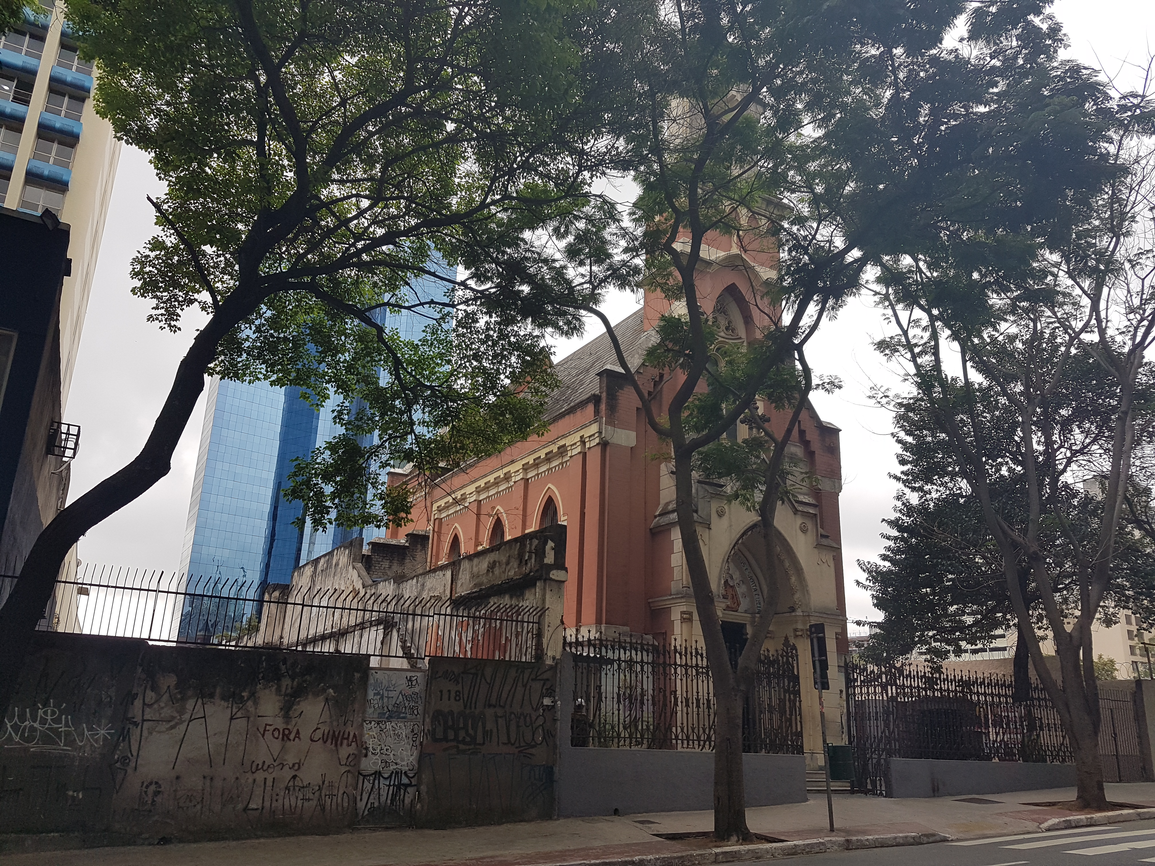 Capela do Menino Jesus e Santa Luzia, situada na Rua Tabatringuera, 104, região da Sé.